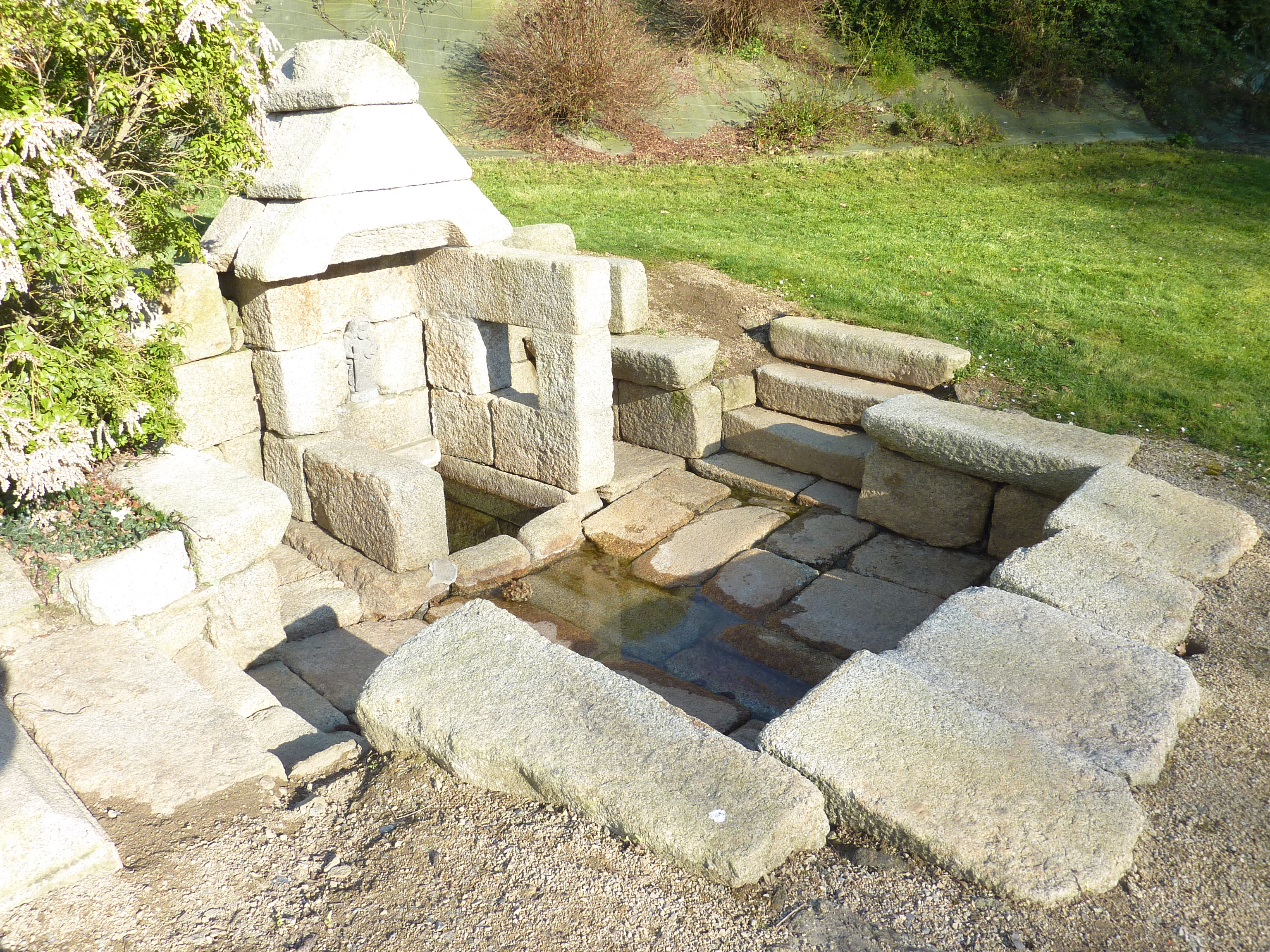 Loc-Eguiner-Saint-Thégonnec : la fontaine Saint-Eguiner